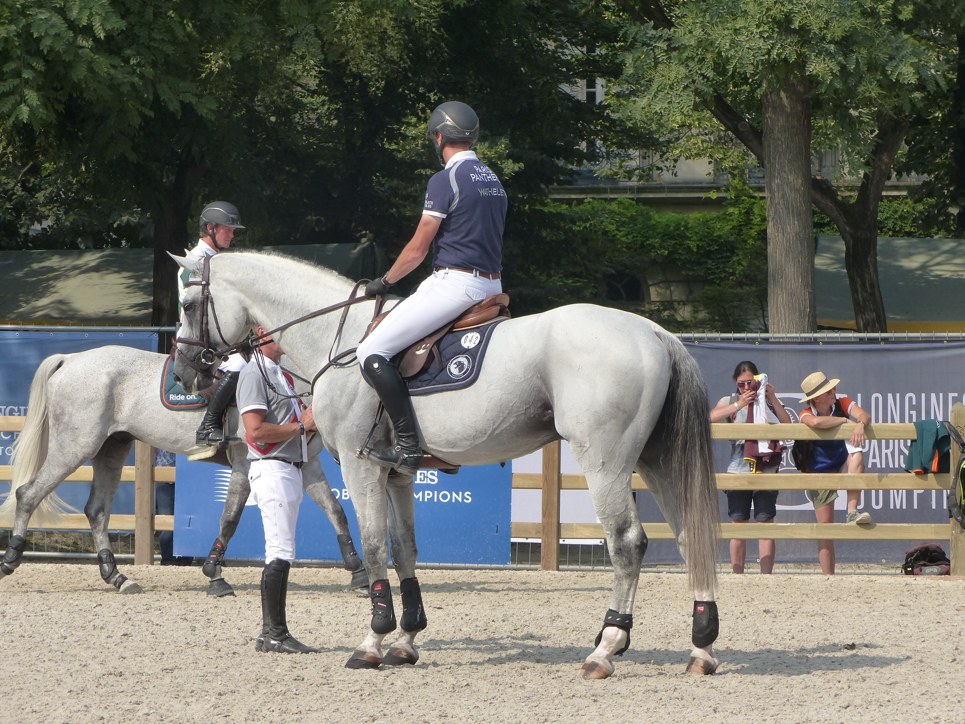 Le cavalier Gregory Wathelet montant MJT Nevados S au Paris Eiffel Jumping 2018.